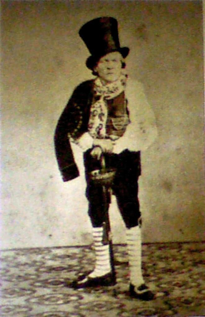 Fotografia dell'attore romanesco Filippo Tacconi